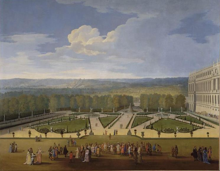 Promenade de Louis XIV en vue du Parterre du Nord dans les jardins de Versailles